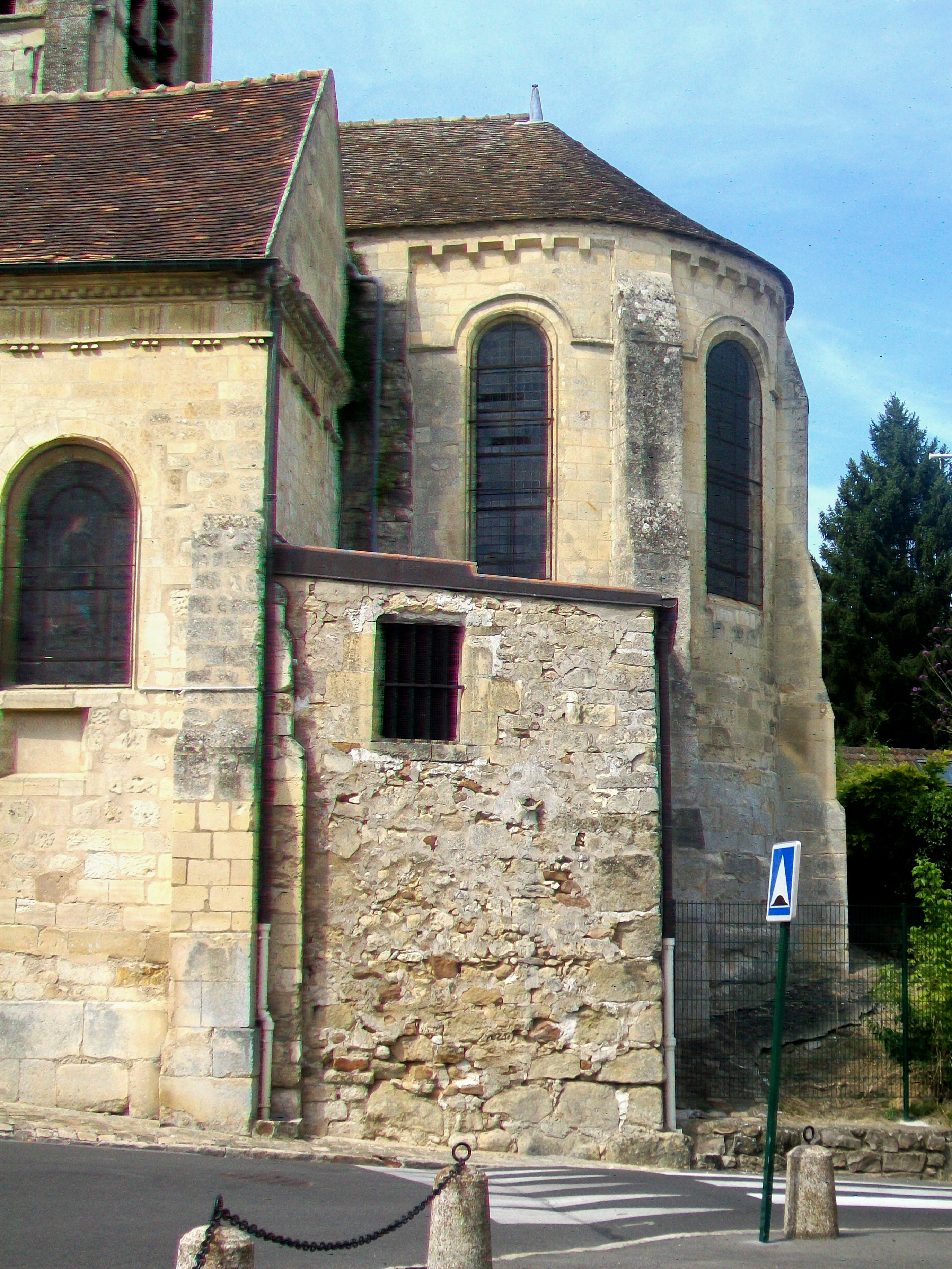 Le chœur, côté sud.